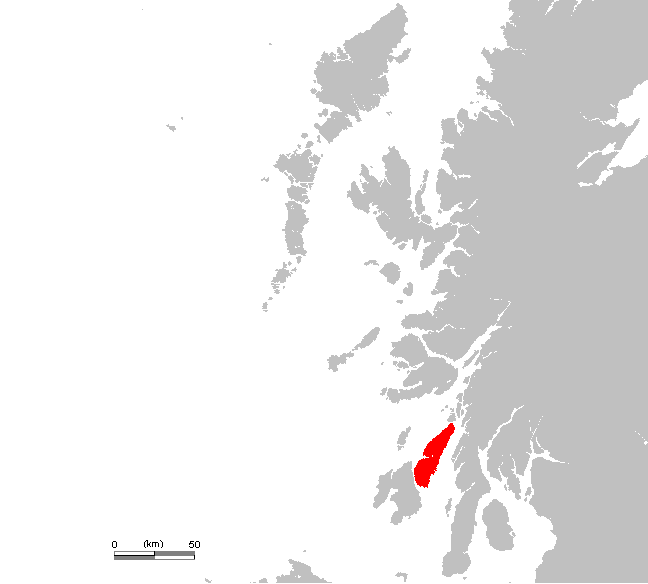 Description:Carte de l'île de Jura en Ecosse, royaume-Uni Auteur:Rémih